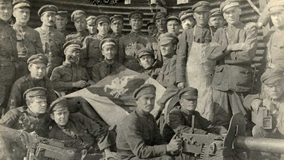 Жаўнеры Беларускага асобнага батальёна са сцягам